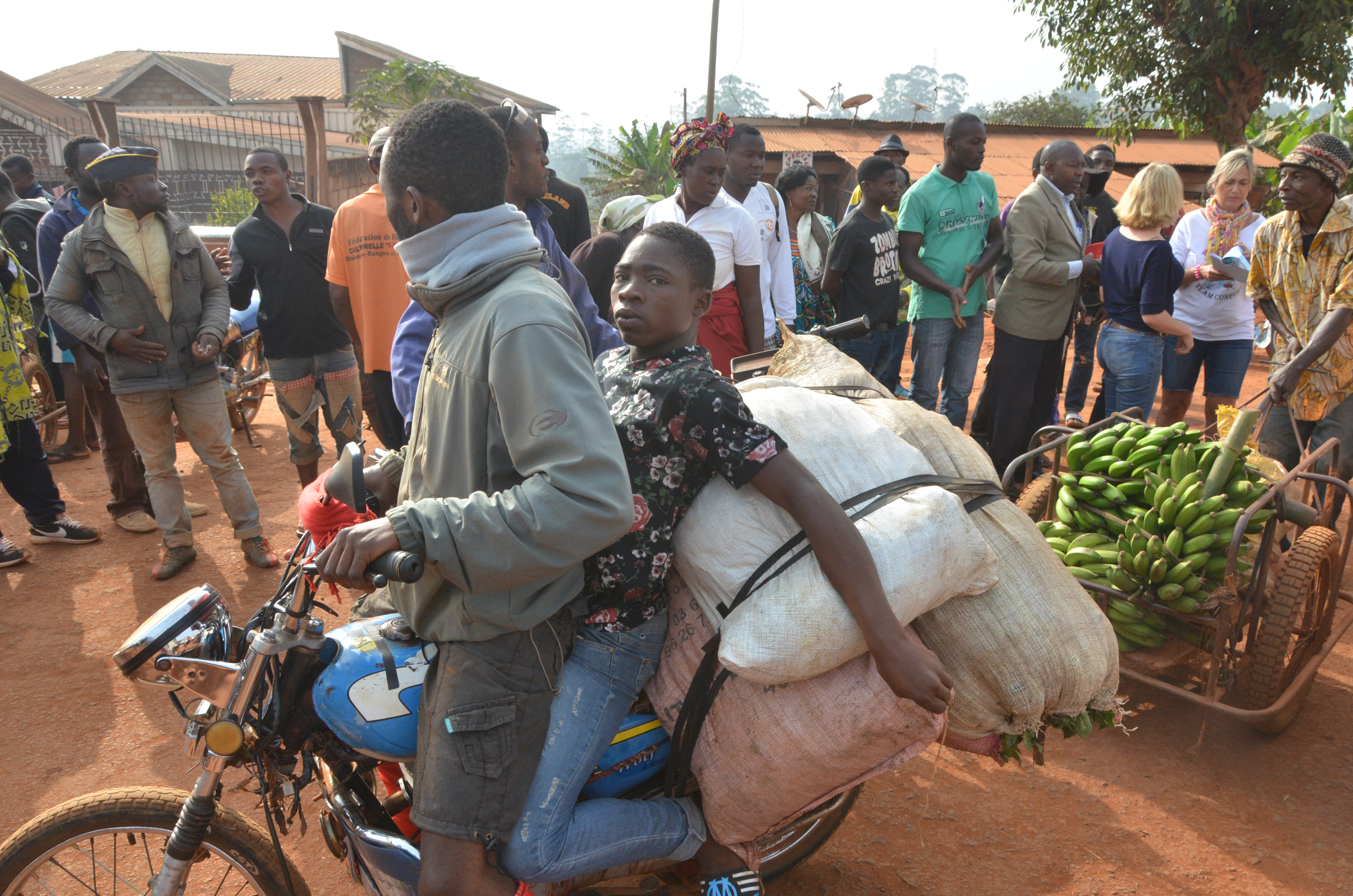 Moto taxi transportant son passager et ses bagages à Mbouda, à l'Ouest du Cameroun This is an image with the theme "Africa on the Move or Transport" from: Cameroon